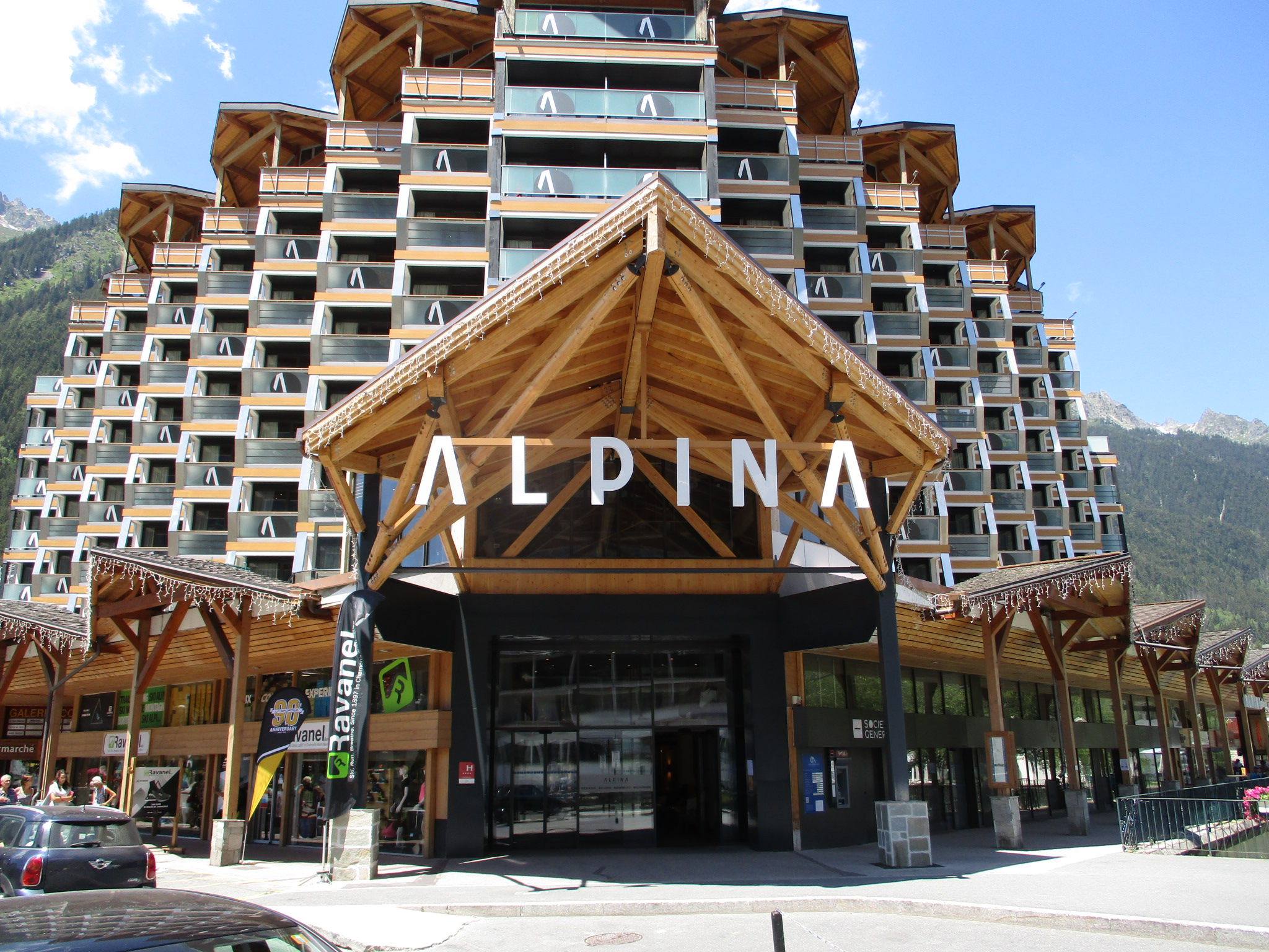 Streets in Chamonix